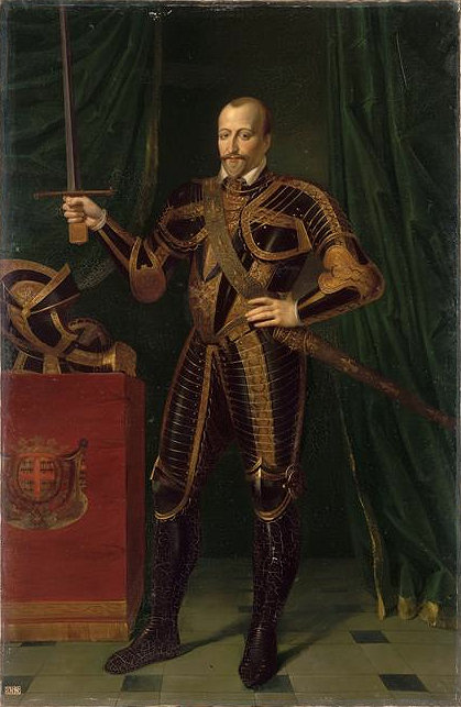 Copie d'après un original jadis dans la collection Montmorency ; commandé par Louis-Philippe pour le musée historique de Versailles en 1834.